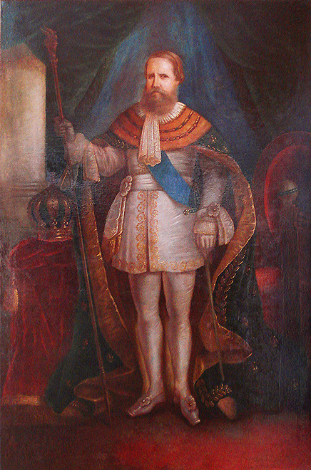 Dom Pedro II